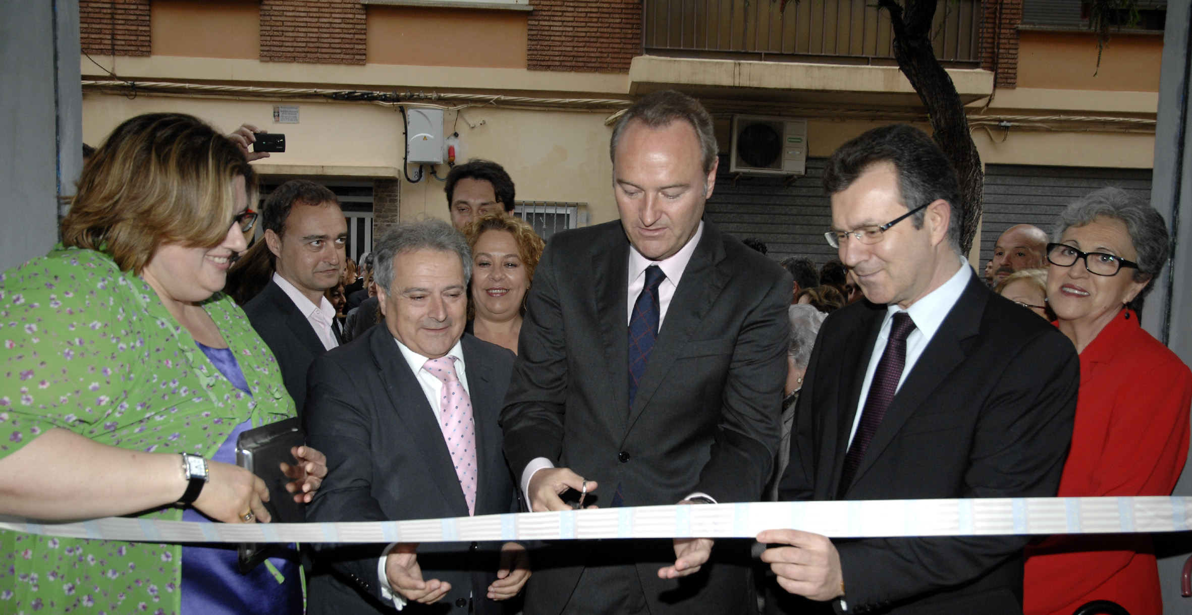 En la inauguración de la sede del PP de Picanya, Alberto Fabra afirma que la “diferencia entre PSOE y PP es que nosotros cambiamos con la sociedad y ellos quieren cambiar a la sociedad” - Indica que el PP tiene que seguir “mejorando en el próximo Congreso Regional porque tenemos que ilusionar a la gente” - Subraya que los populares “creen en las personas y los políticos tienen que materializar su fuerza e ilusión en políticas que generen expectativas de futuro”